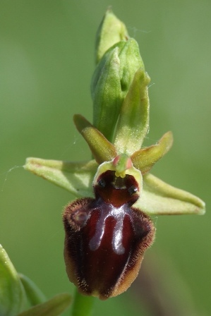 Pókbangó az ásotthalmi lápréten